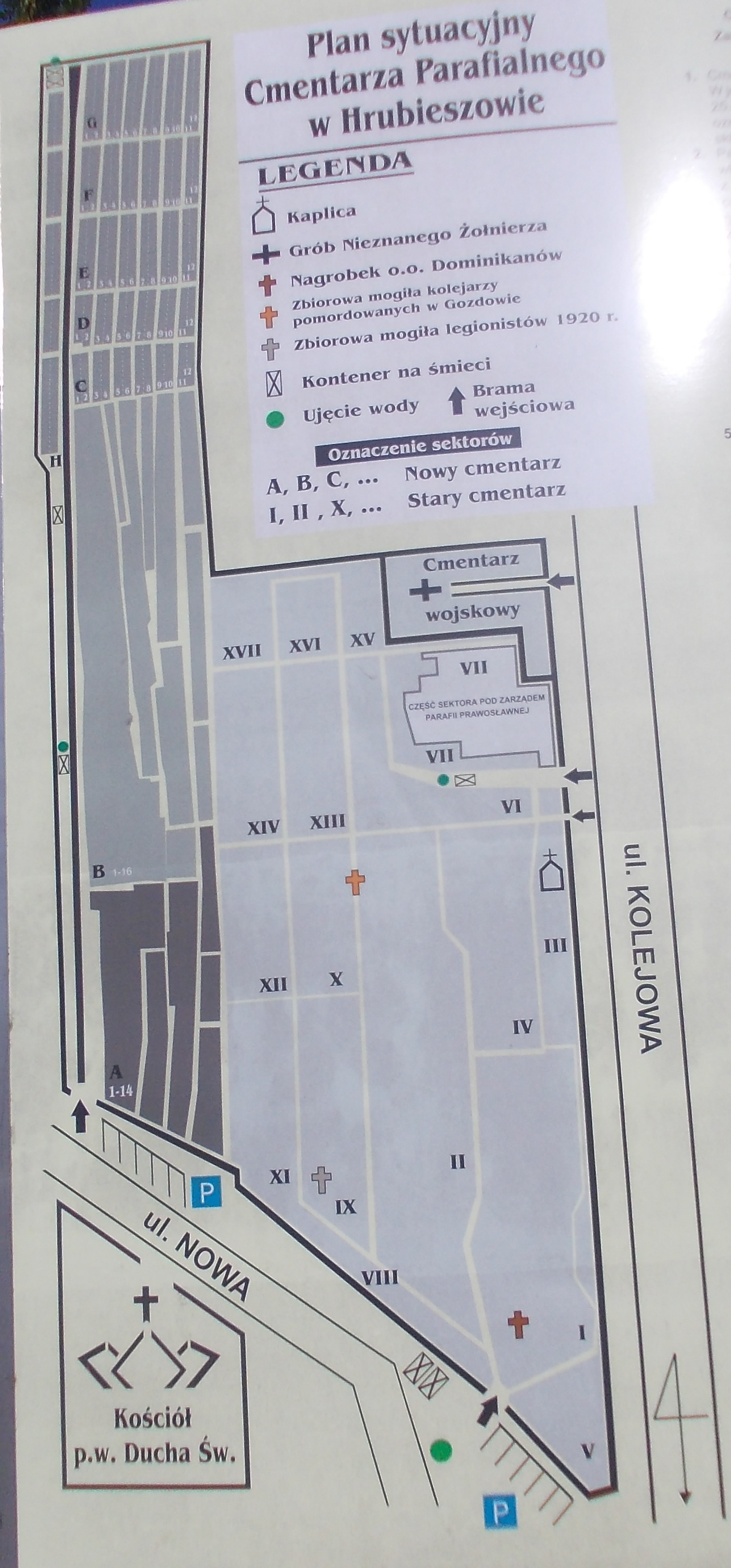 План цвинтаря в Грубешові. Фото І. Парнікози, 2020 р.